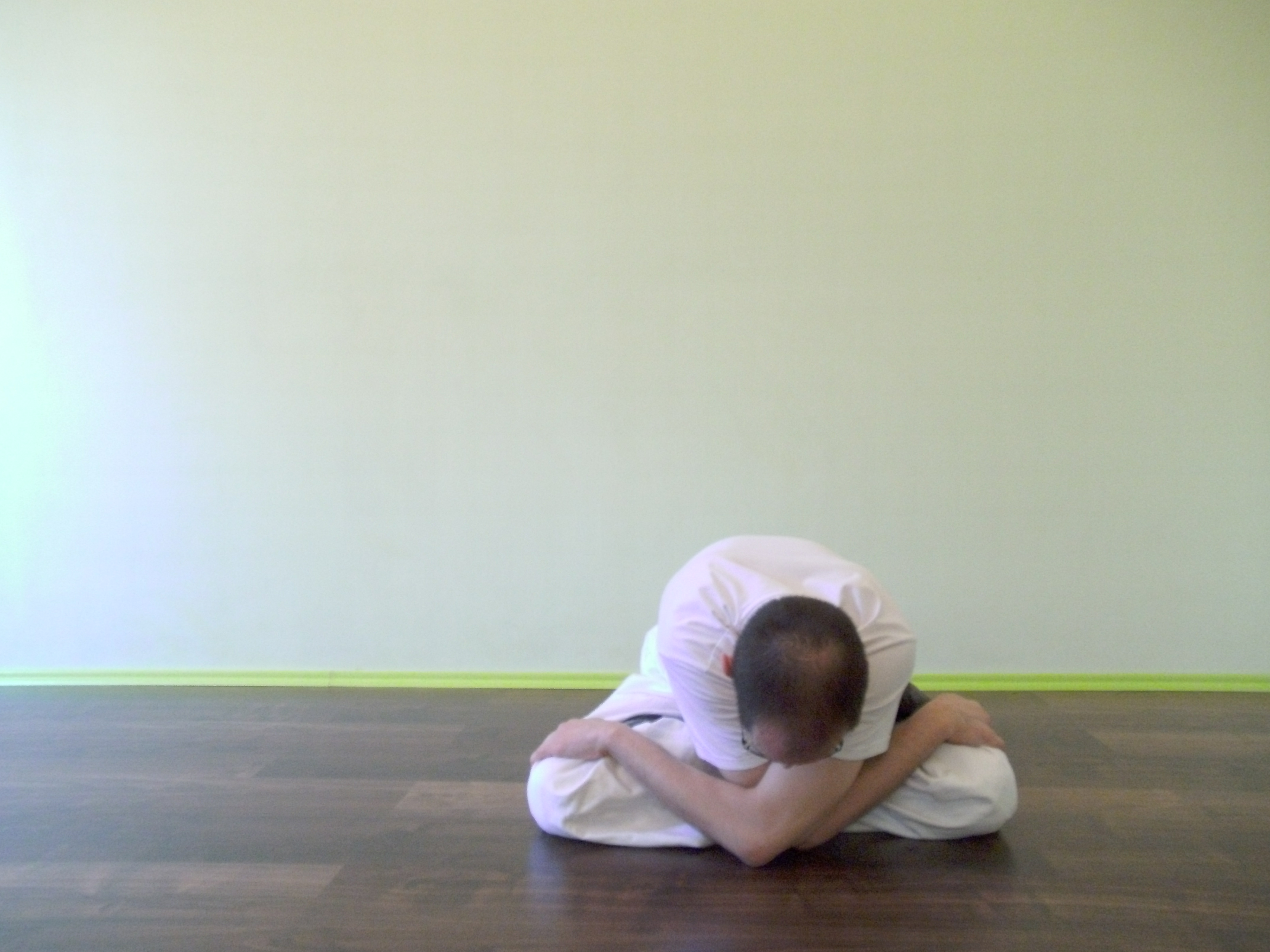 Makko Ho Übung für Perikard- und Dreifacher Erwärmer Meridian 2. Übung